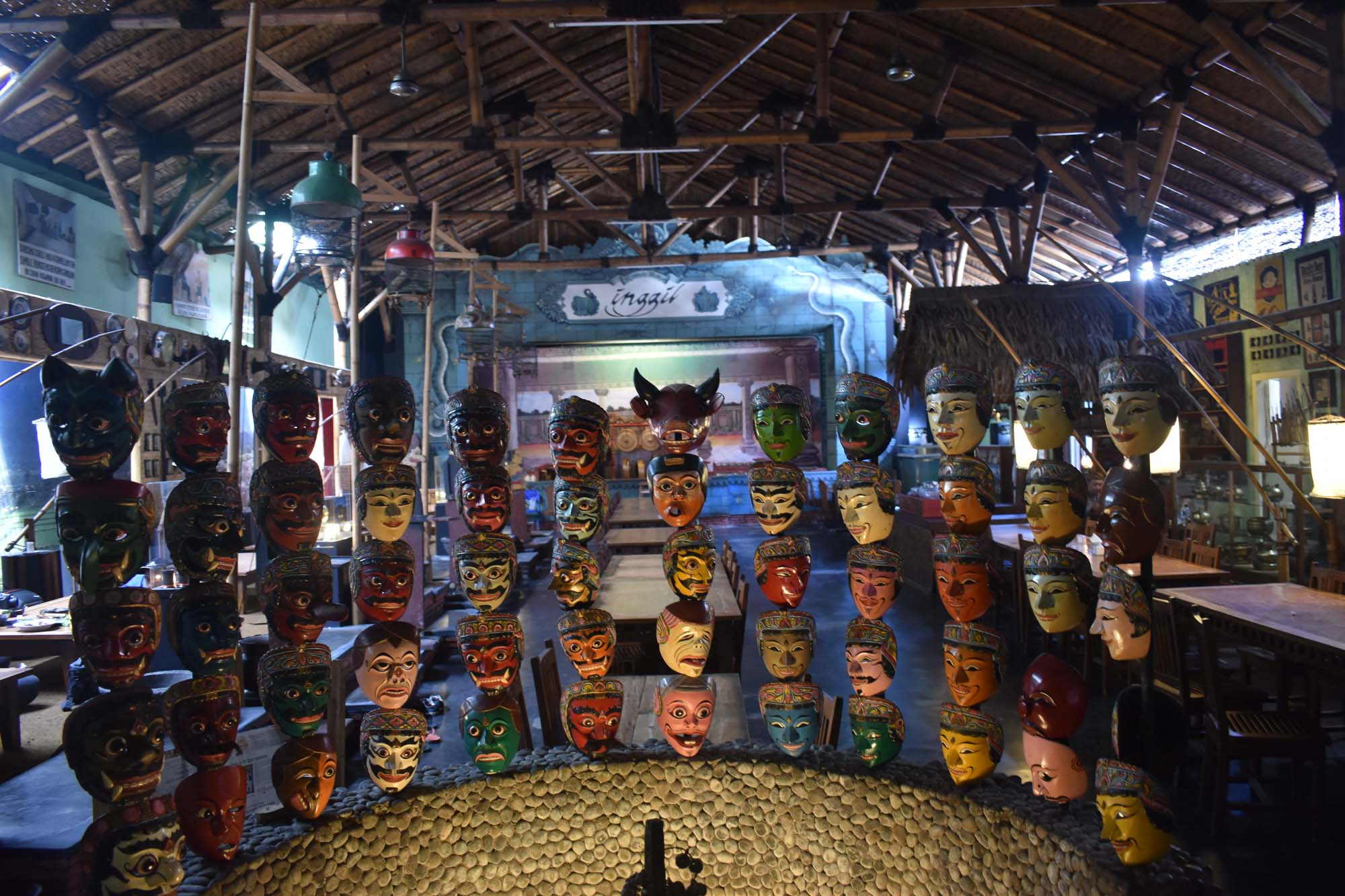 Sebuah barisan topeng malangan yang terdapat di restauran museum yang terletak di jalan ijen ,malang